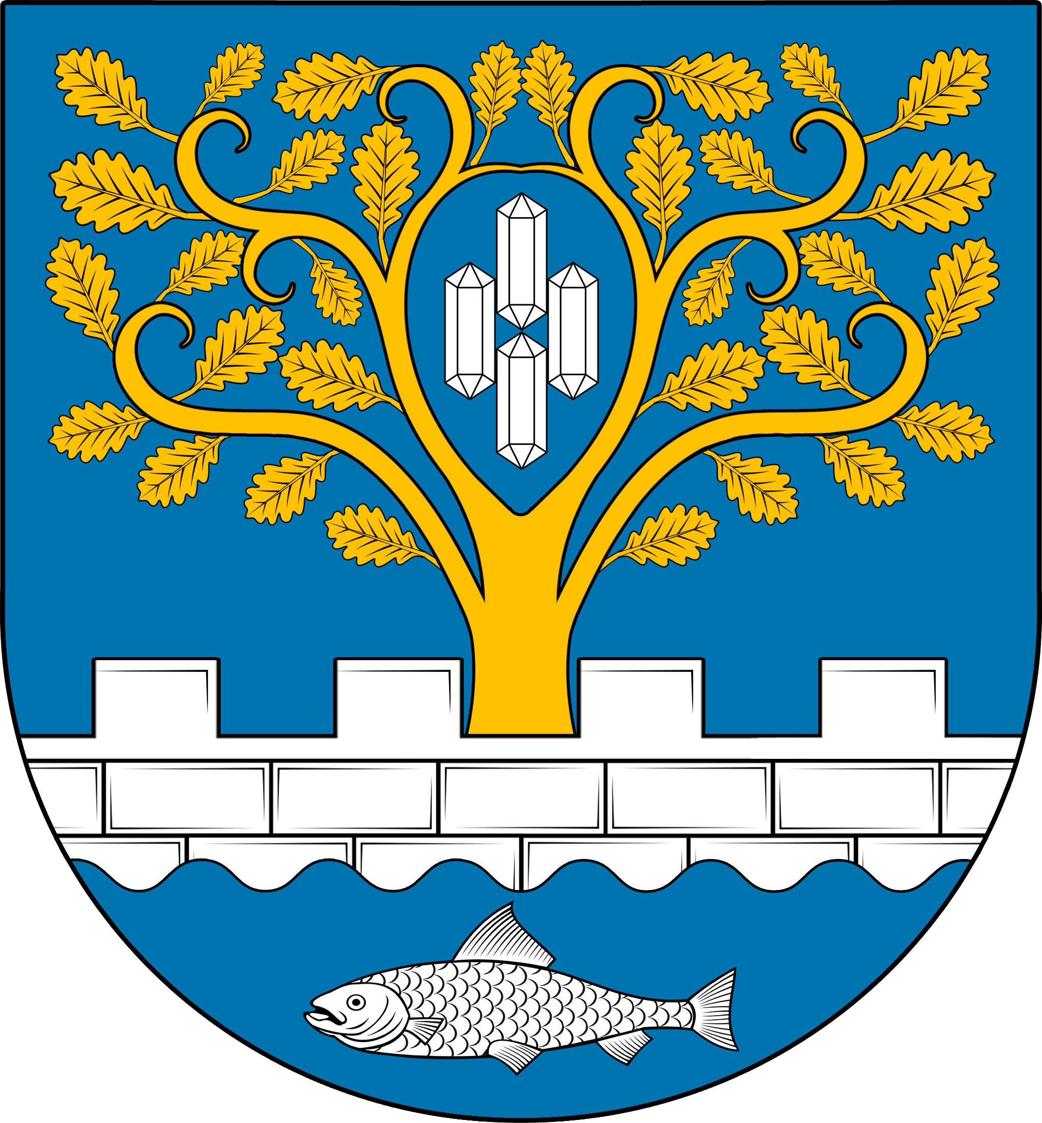 Escudo de Hosena.